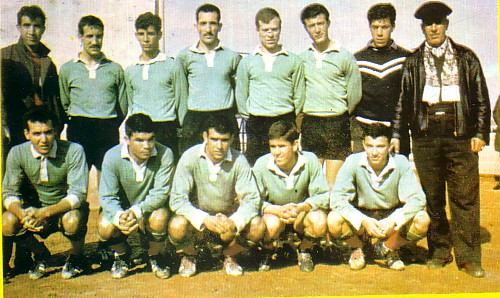 Equipe de la Jeunesse sportive de Kabylie en 1963 De Gauche à Droite: Debout: Djezzar, Merrad, Rafaï, Haouchine, Terzi, Harrouni, Ammari, Hammoutène (entraineur). Assis: Tamine, Ouahabi, Karamani, Kolli, Khalfi.